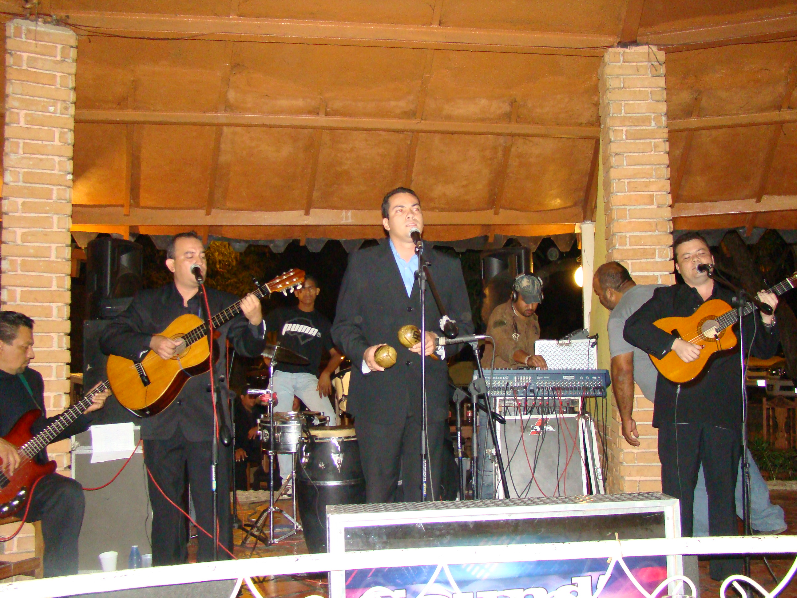 ACTUACION DEL TRIO ALBORADA EN EL HOTEL SPA AGUAS TERMALES DE SAN JUAN DE LOS MORROS, ESTADO GUARICO, VENEZUELA